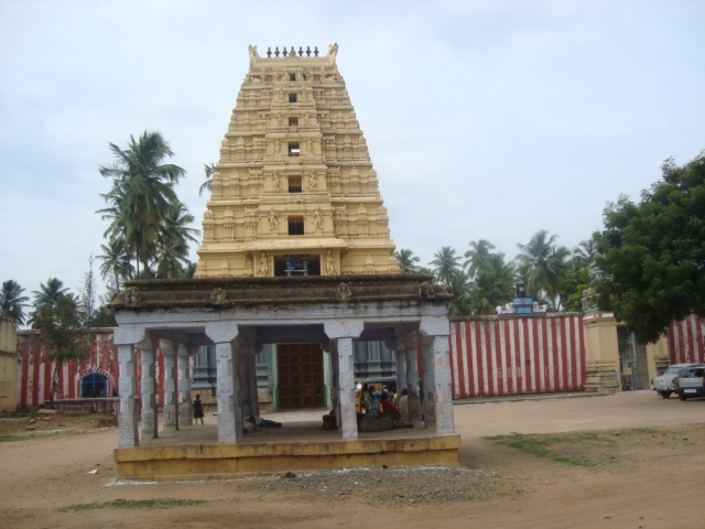 சின்னமனூர் கோயிலின் முகப்பு